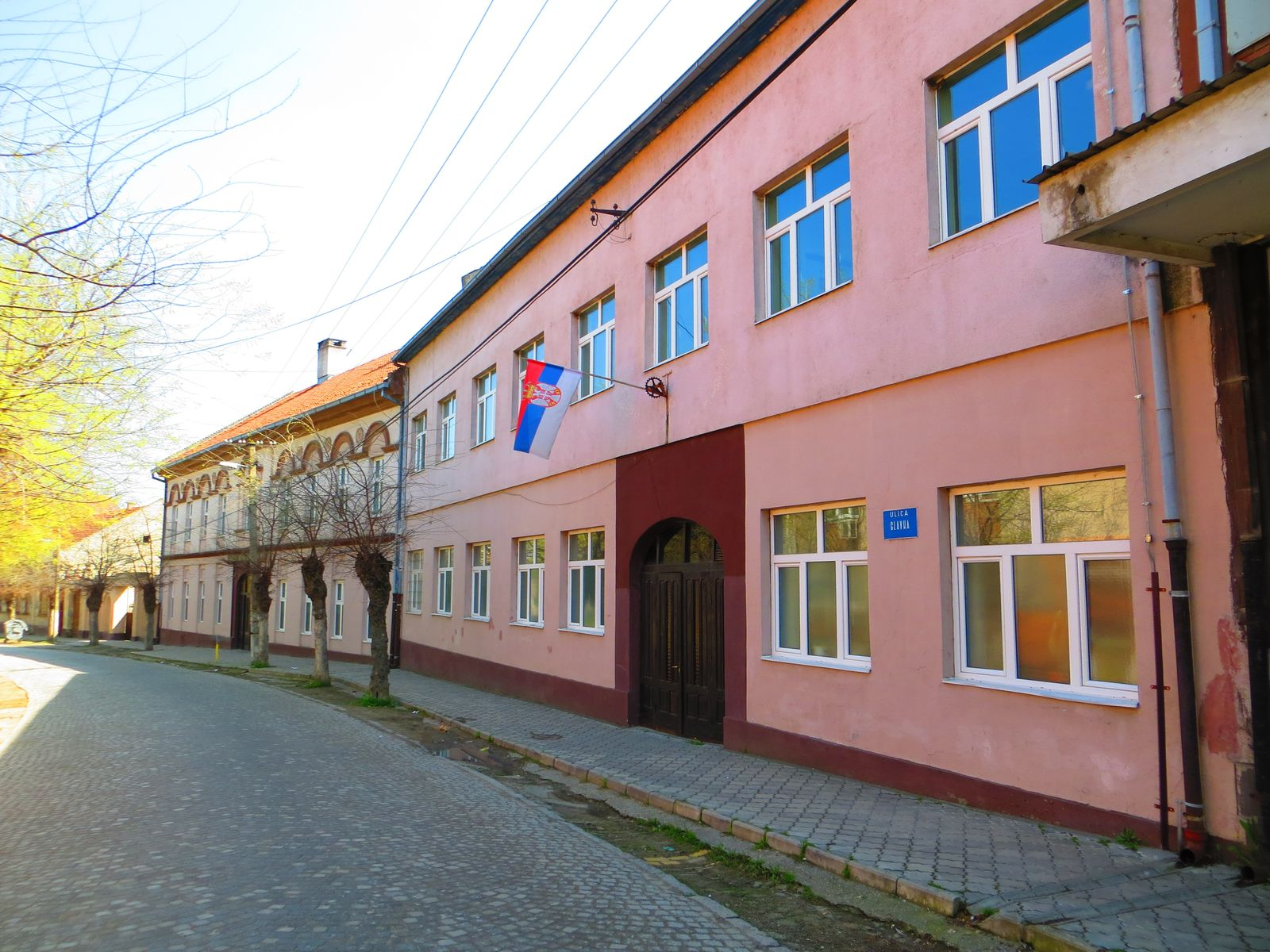 Zgrada opštine